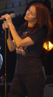 Natalie Imbruglia Live in Paradiso Amsterdam 1 november 2005